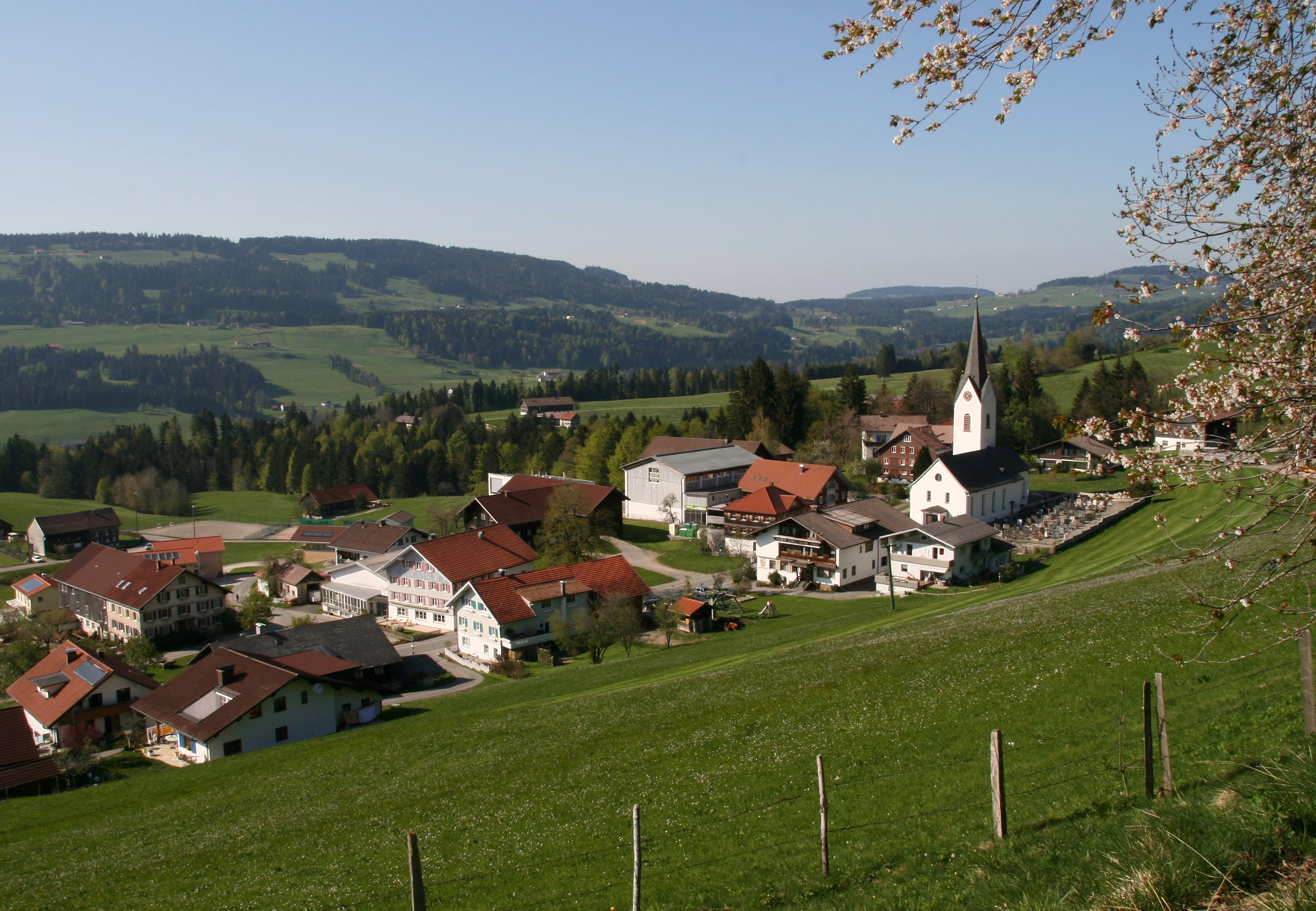 Blick ins Kirchdorf und zur Pfarrkirche hl. Leonhard in Riefensberg, Vorarlberg.